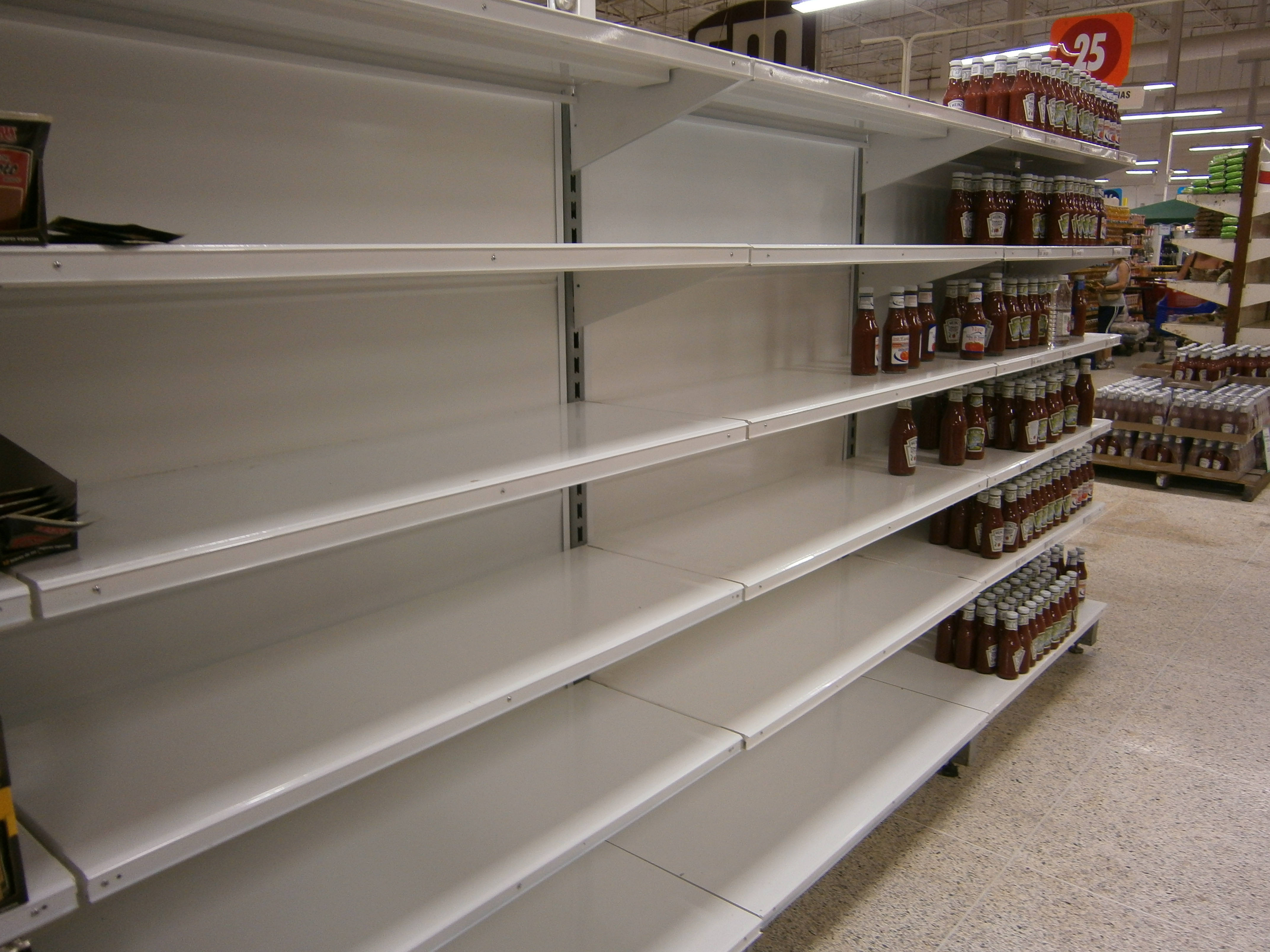 Escasez en Venezuela, Central Madeirense